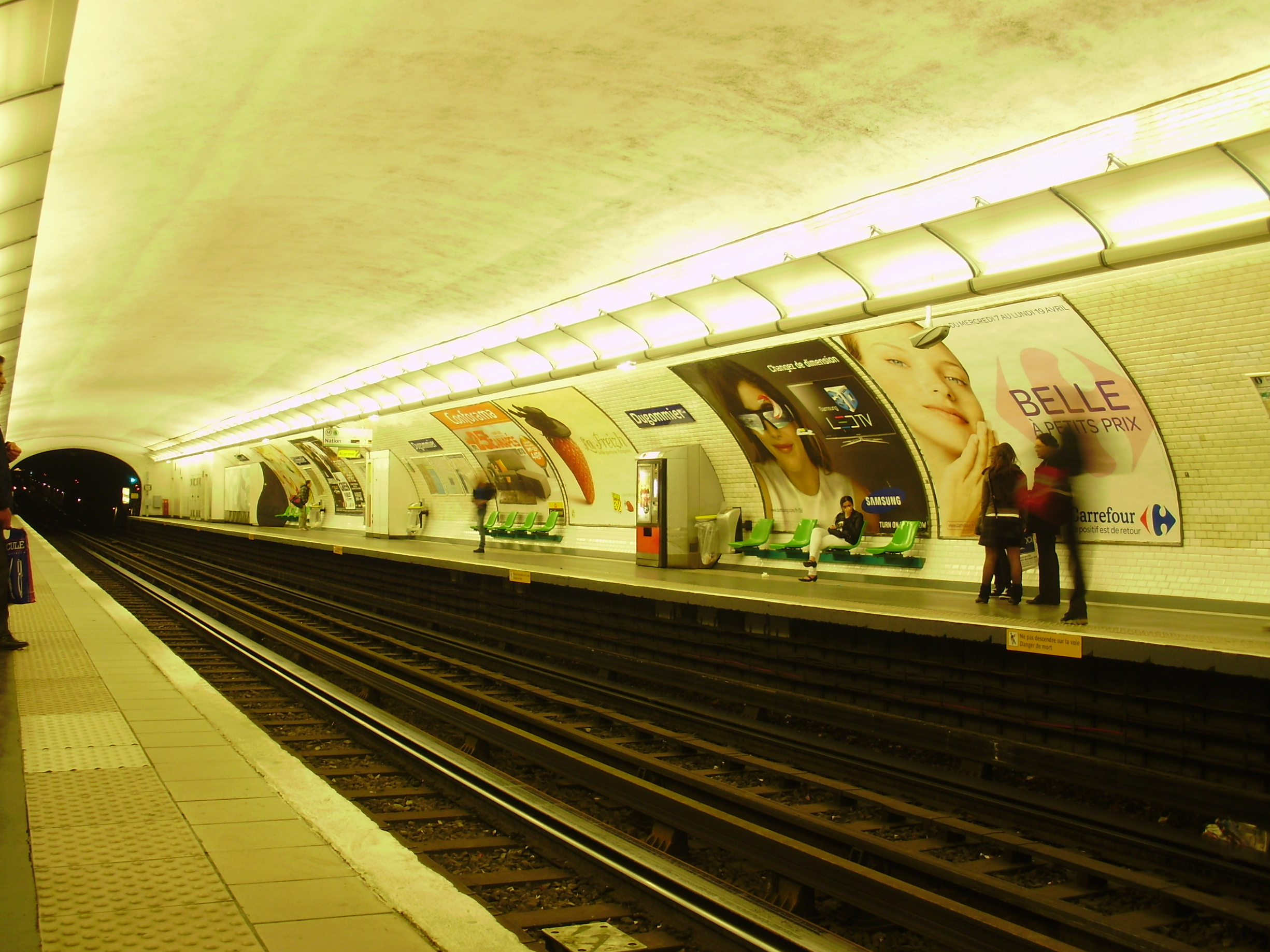 Quais de la station Dugommier du métro de Paris